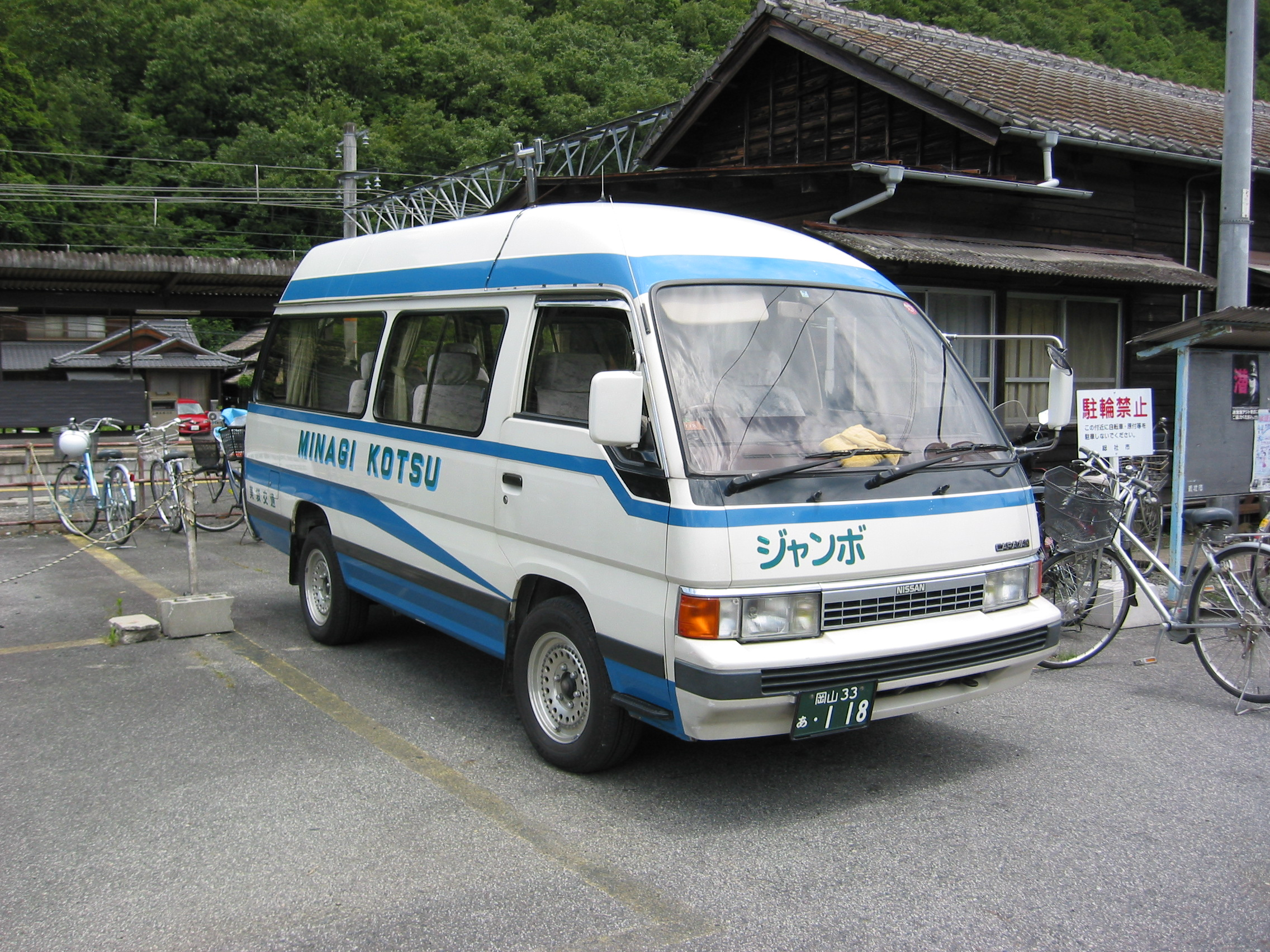 美袋交通 路線バスの車両 ※ジャンボタクシーを使用